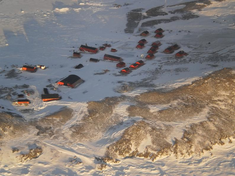 En el Día del Estudiante, alumnos y docentes de la Antártida Argentina recibieron por primera vez las netbooks de Conectar Igualdad. El responsable de una de las delegaciones de ANSES en Tierra del Fuego, Juan Carlos Arcando, viajó junto a representantes del Ministerio del Interior y la Fuerza Aérea Argentina a Base Esperanza para entregar 14 computadoras portátiles a la Escuela Provincial Nº 38, la única de la Antártida. Sobre esta entrega, el titular de ANSES, Diego Bossio, sostuvo: “Un Estado inclusivo es aquel que llega a cada uno de los ciudadanos de su territorio. Por eso con Conectar Igualdad también nos acercamos a la única escuela de la Antártida, para que esos chicos también tengan acceso a una mejor educación”. Base Esperanza es una de las seis bases permanentes en la Antártida Argentina y está constituida por científicos, maestros de escuela, dotación del Ejército y Aeronáutica y sus respectivas familias, totalizando un promedio de 40 personas. Debido a las condiciones climáticas, la entrega de netbooks al personal docente debió realizarse en tan solo 10 minutos en la misma pista de aterrizaje sobre un glaciar, a 500 mts. de la Base. Hasta el momento, Conectar Igualdad entregó más de 1.200.000 netbooks a escuelas secundarias públicas, escuelas de educación especial e institutos de formación docente de todo el país. Para fin de año se estima llegar al 1.800.000 y como meta final a 3 millones de computadoras. El programa está cambiando la educación argentina, ya que favorece la inserción de los jóvenes y de sus familias en el conocimiento de las nuevas tecnologías, promoviendo valores tales como la integración e inclusión. Al mismo tiempo, esta medida busca recuperar y valorizar la escuela pública, garantía del derecho a la educación gratuita.